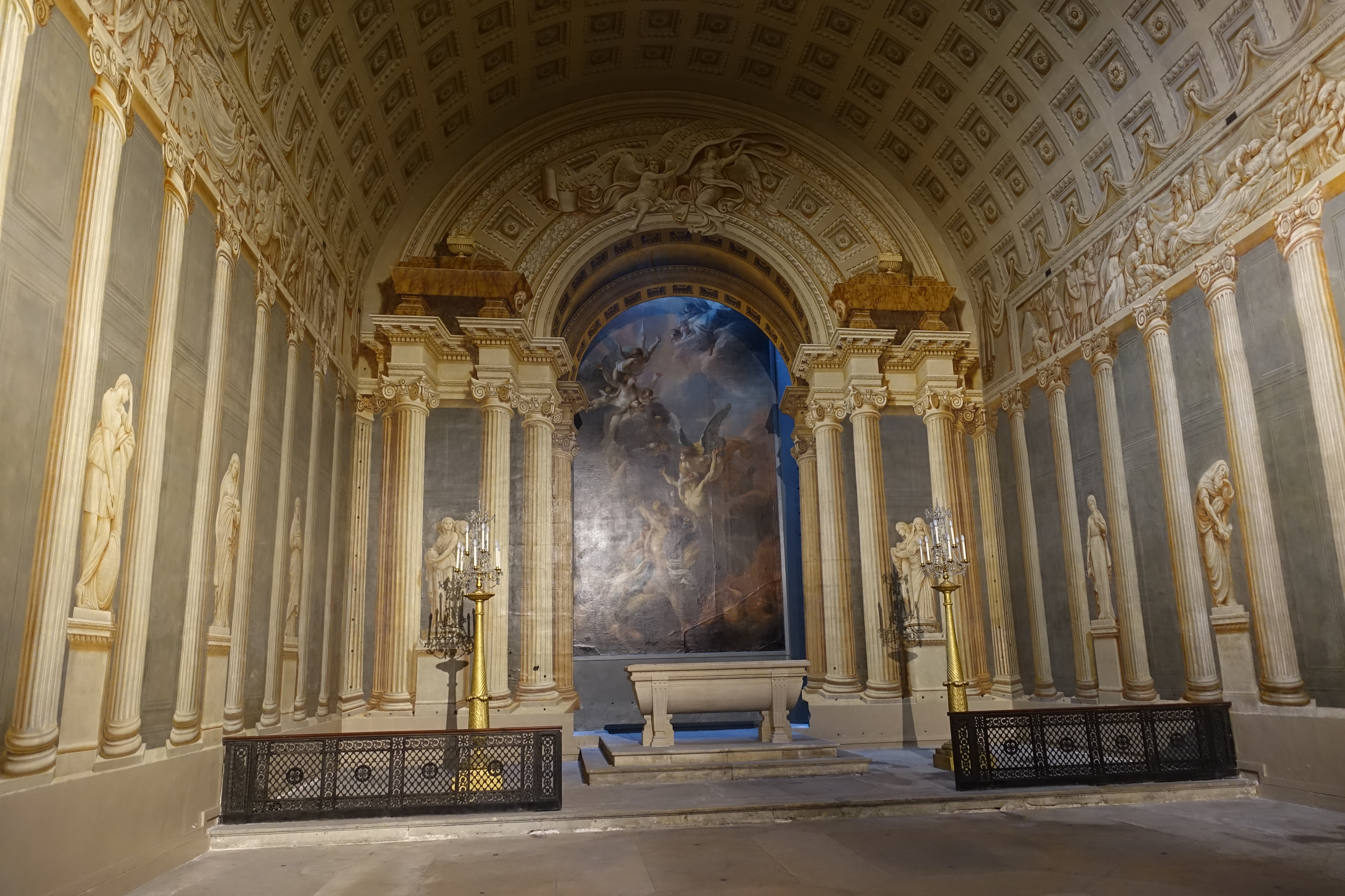 Chapelle des Âmes-du-Purgatoire (architecte Victor Louis; trompe-l'œil par Paolo Antonio Brunetti), Église Sainte-Marguerite de Paris, 36 rue Saint-Bernard, Paris, France.